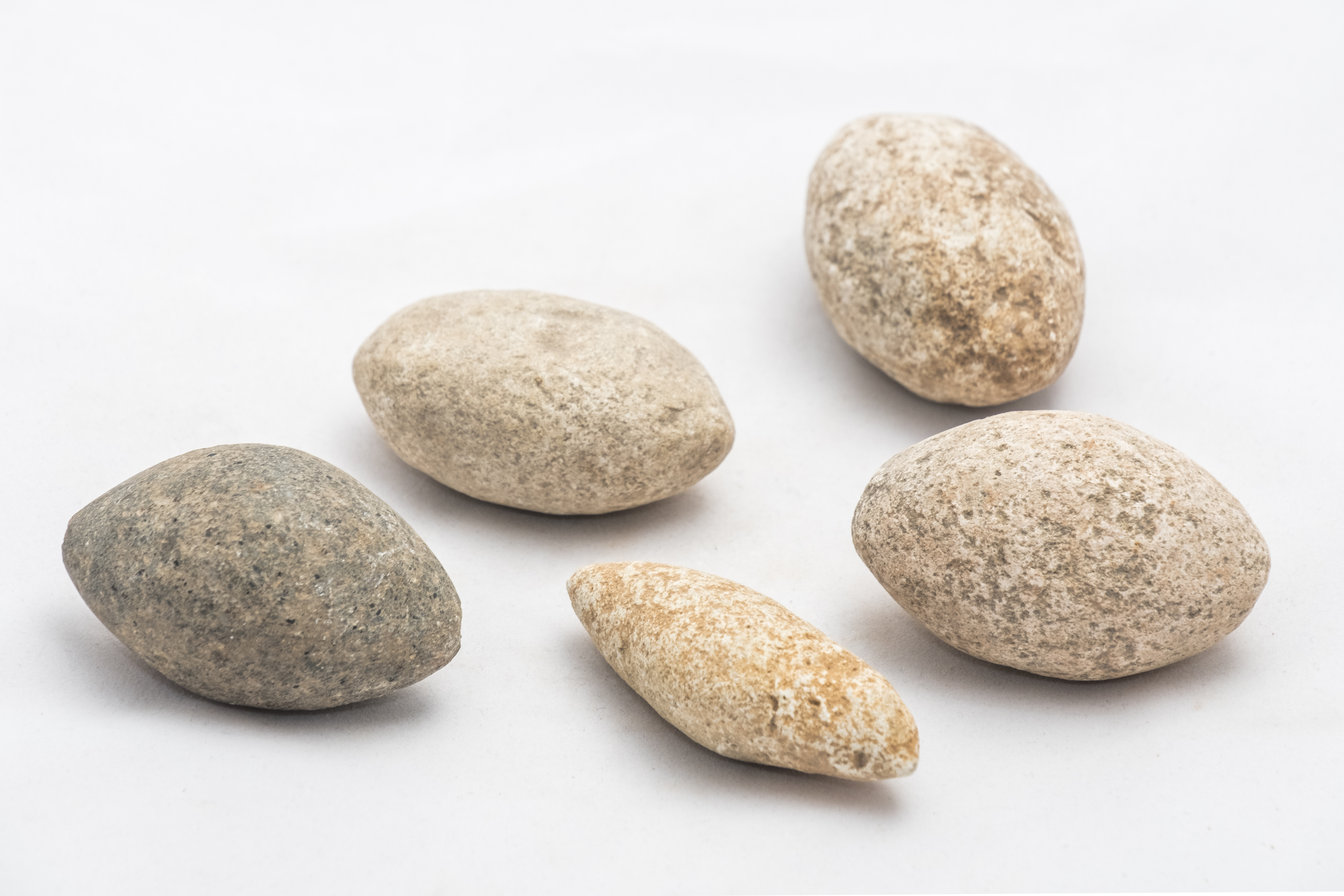 Possible projectil de fona en pedra